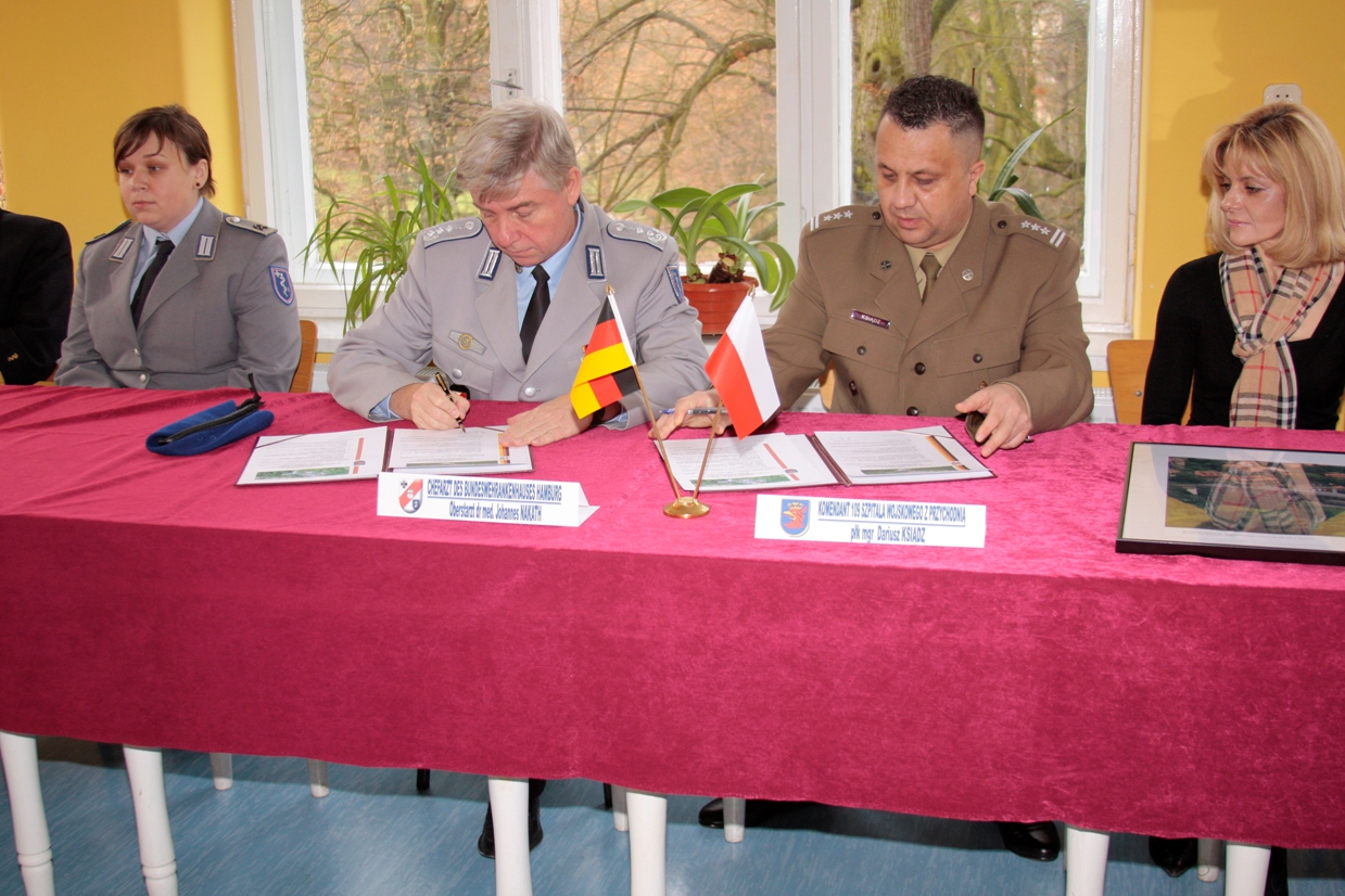 Szczecin 2008r. Wizyta w 109 Szpitalu wojskowym delegacji z wojskowego szpitala w Hamburgu.